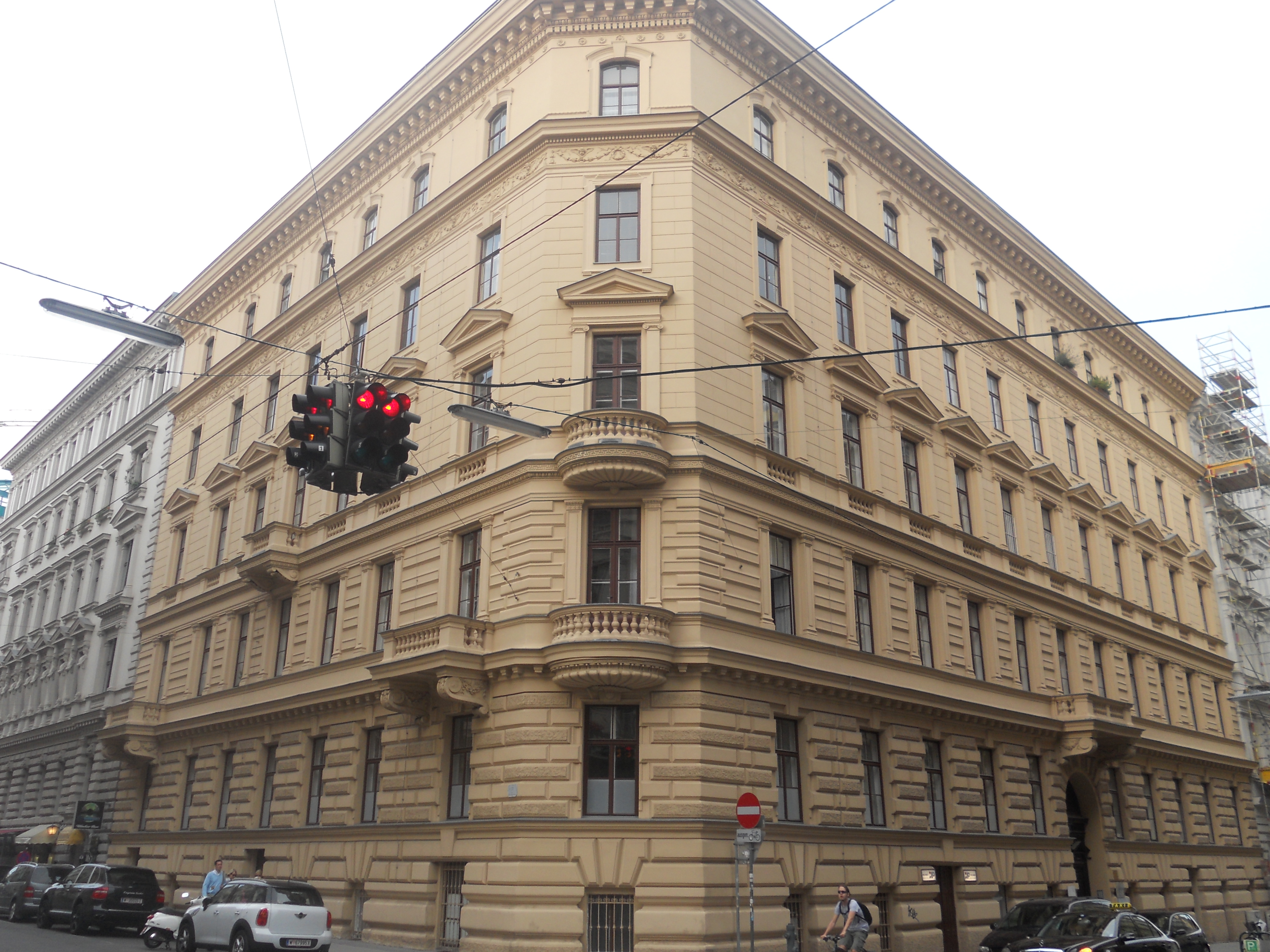 Haus Nibelungengasse 8, Ecke Eschenbachgasse in Wien